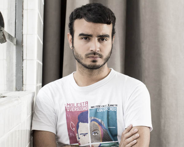 Daniel Arzola por Andrés Rodríguez